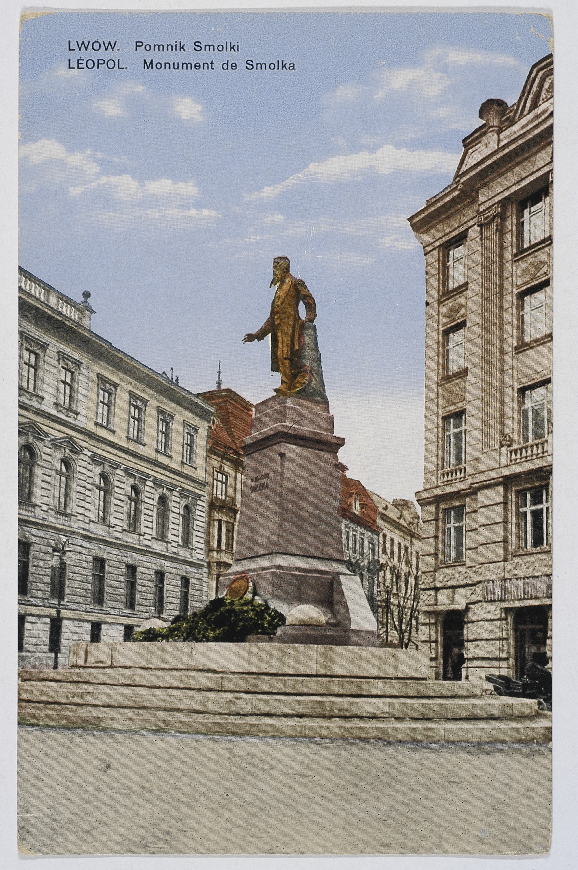 Franciszek Jan Smolka, pomnik autorstwa Tadeusza Błotnickiego, pocztówka z ok. 1914 r.